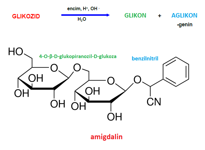 shema hidrolize in poimenovanja glikozida